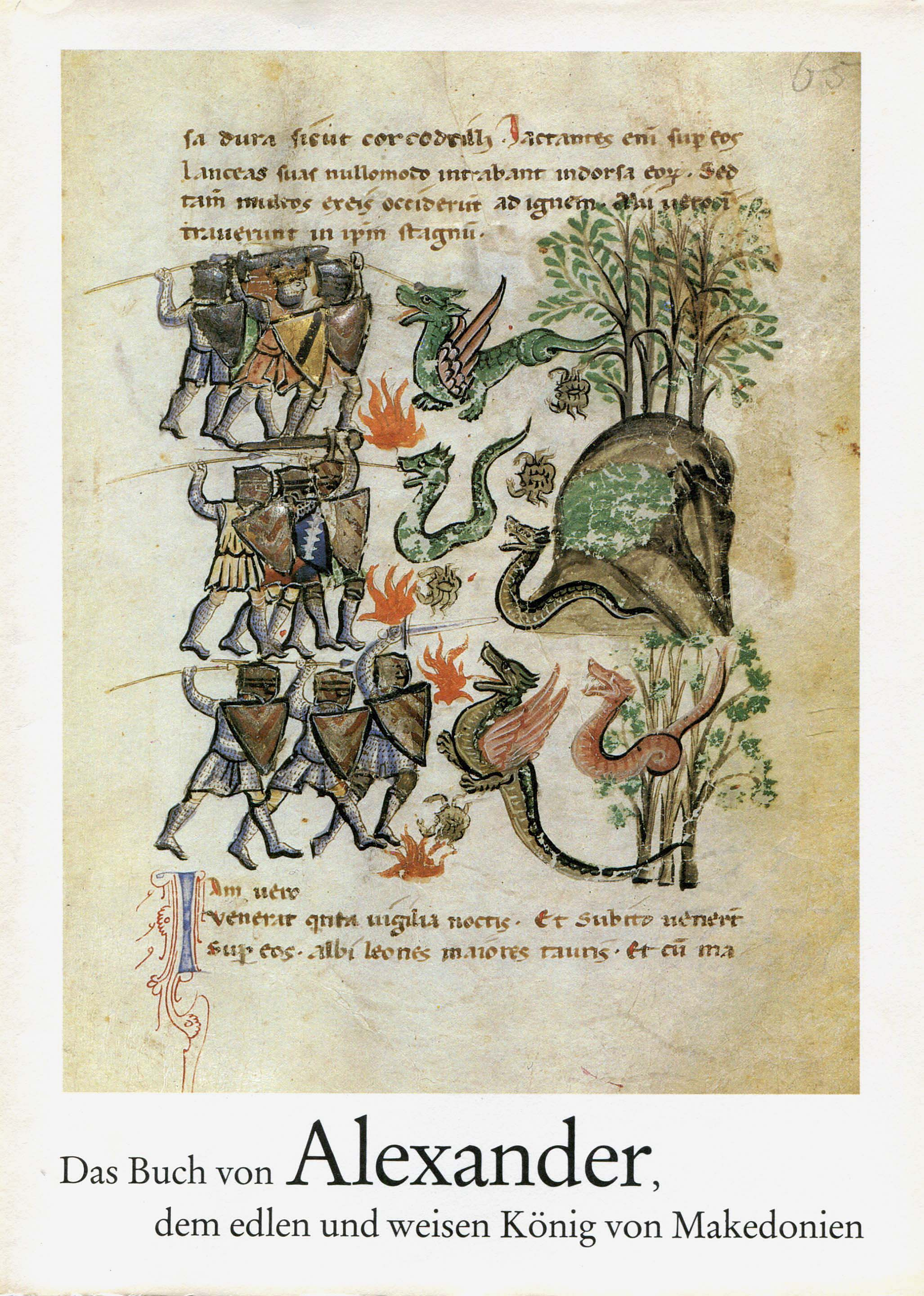 Buchumschlag zu Alexander von Makedonien